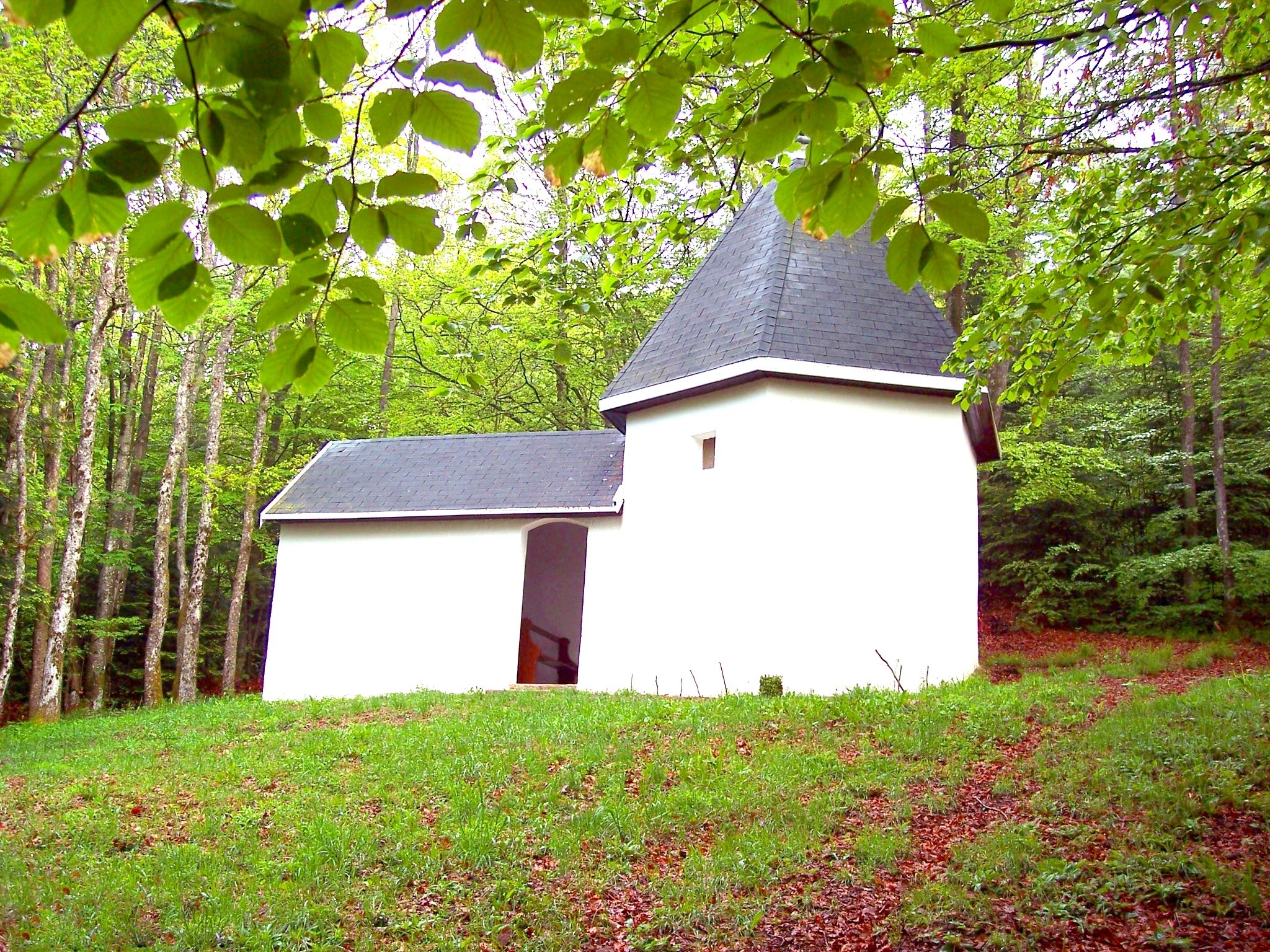 Chapelle du Grippot à Grosmagny. Territoire de Belfort.